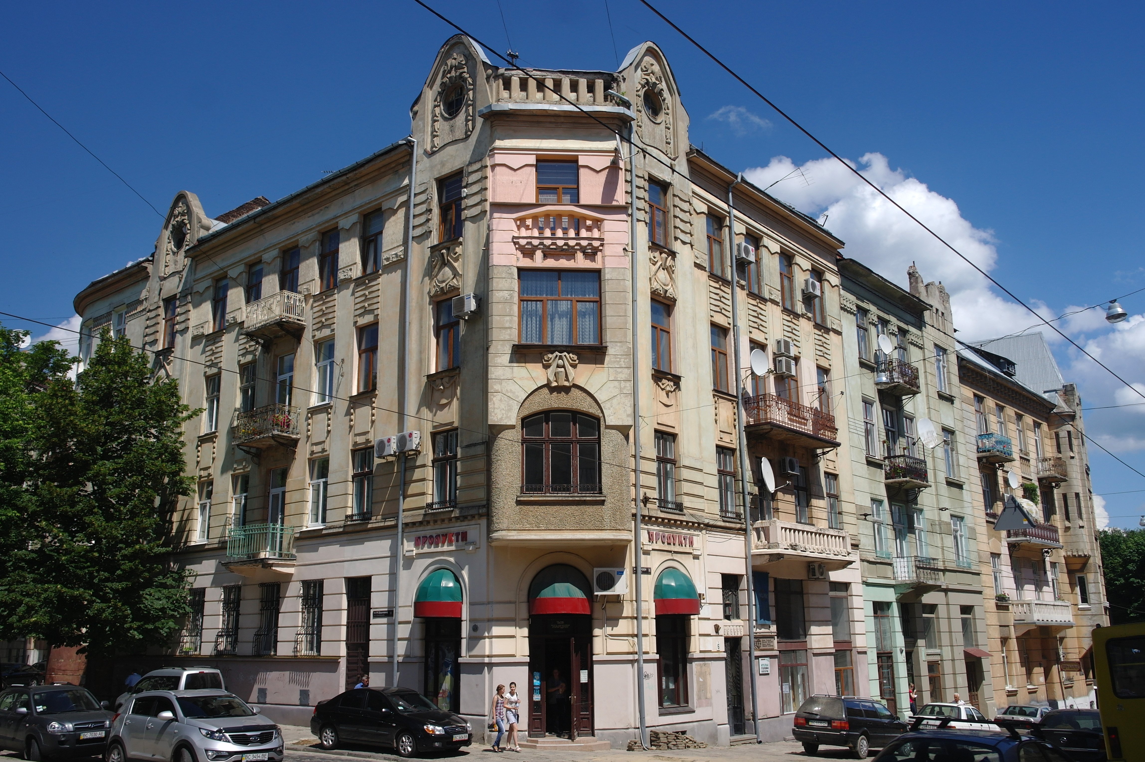 Львів, Бандери, 6